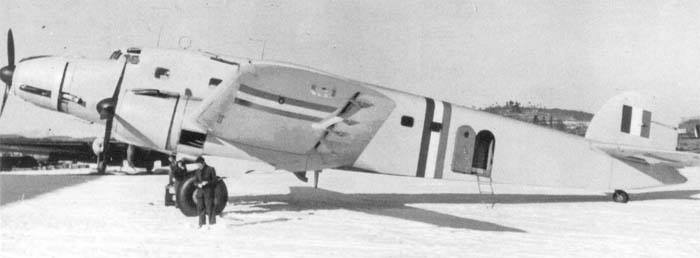 Aereo Savoia Marchetti SM.90